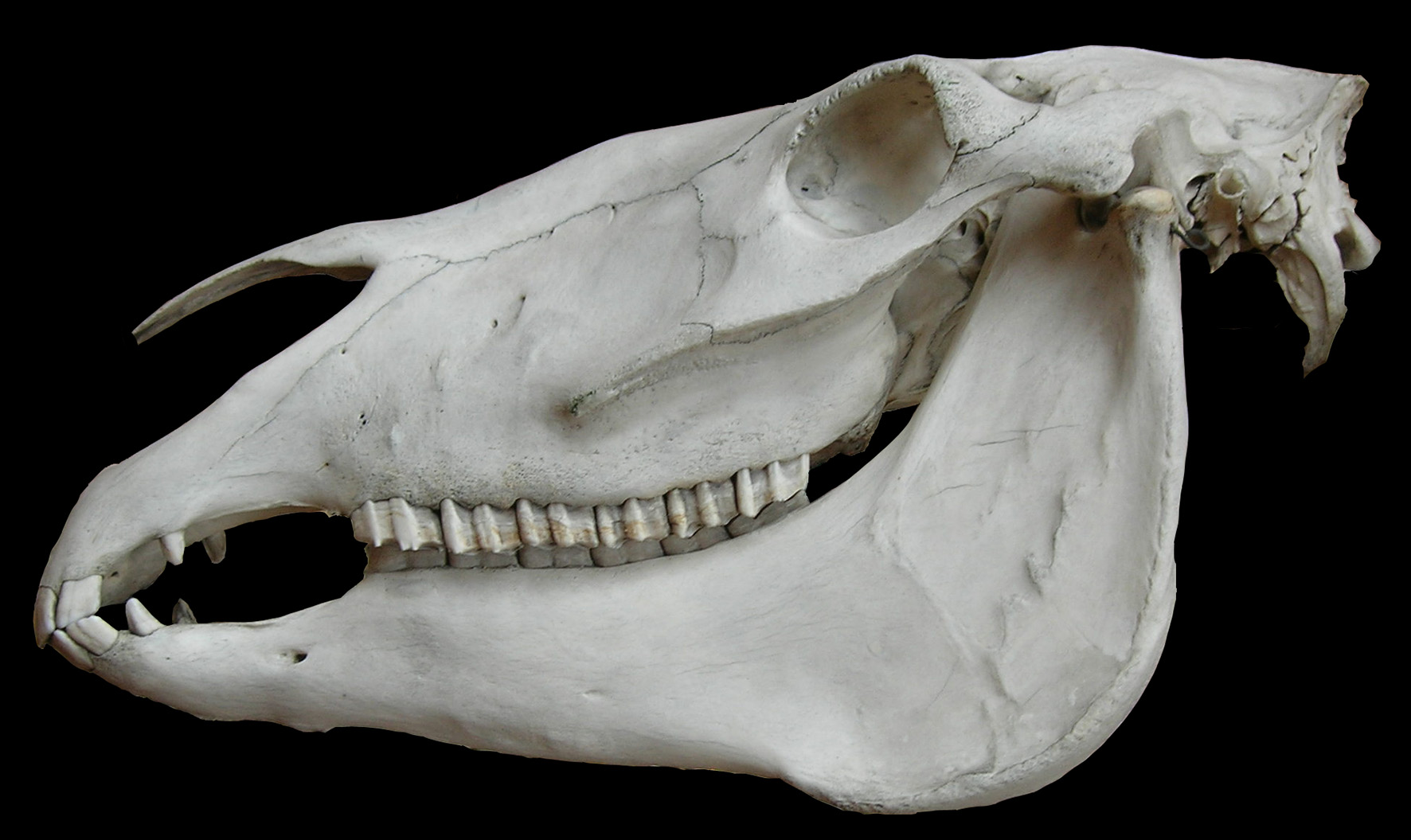 Horse skull.Museum d'histoire naturelle.Paris.